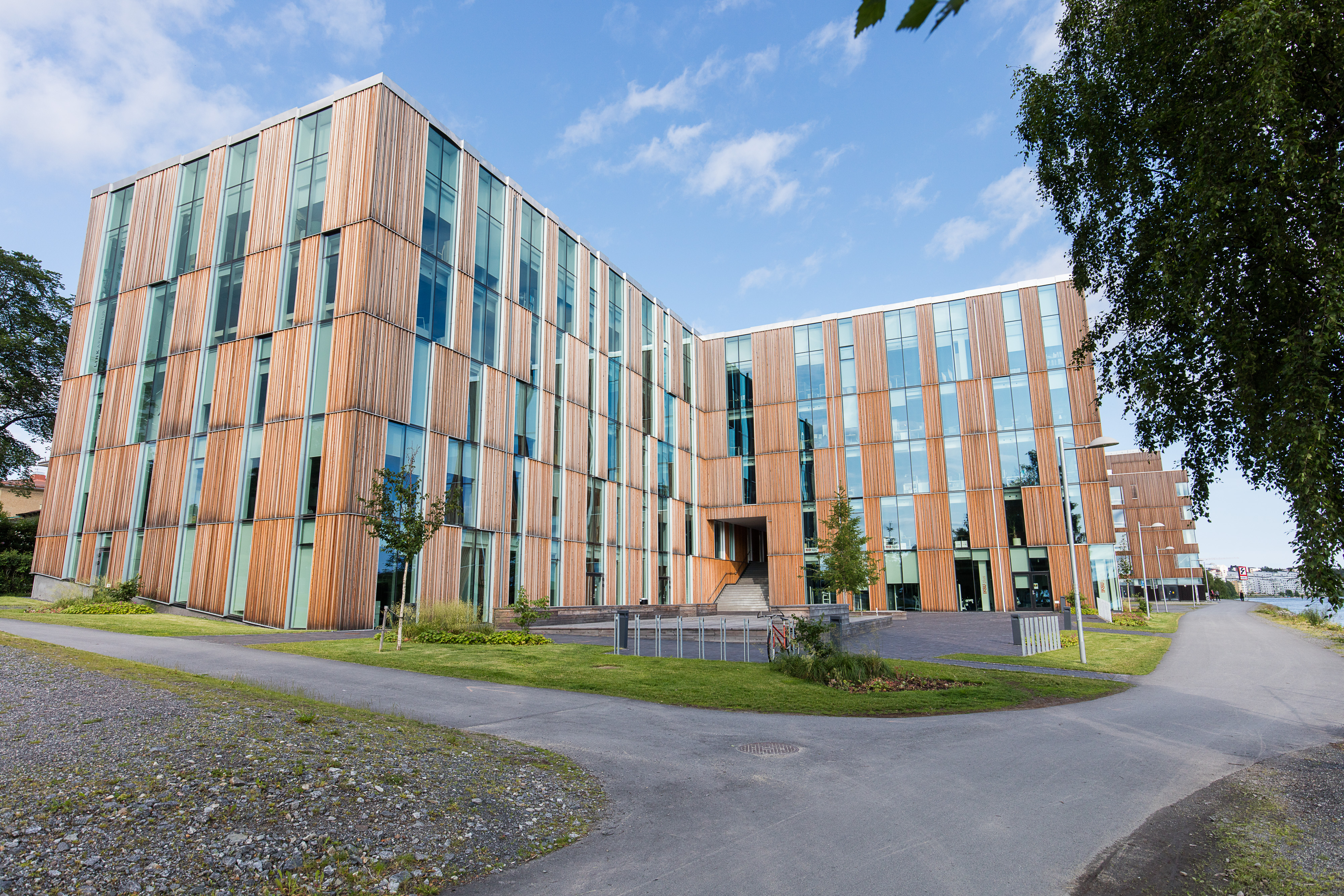 I utkanten av Konstnärligt campus har rymmer detta kontorshus bl.a. Iksu Plus